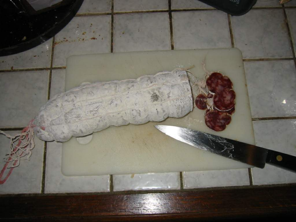 Salaison de montagne, Noël Thaurin, Moutaine, Jura, France